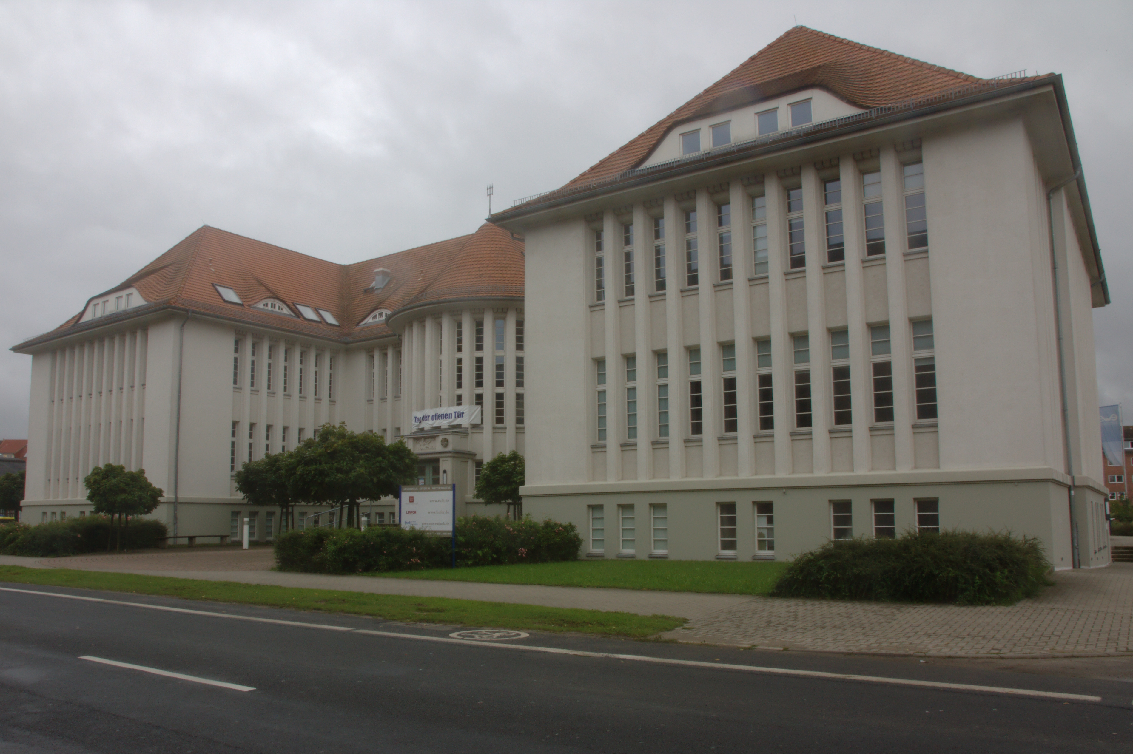 Werftstraße 5, Rostock (Baudenkmal), Standort der EUFH (Europäische Fachhochschule)